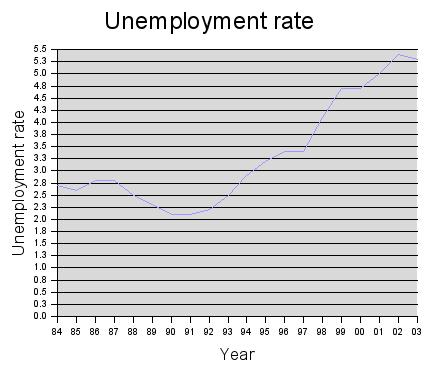 tasa de desempleo desde 1984 a 2003 en Japón